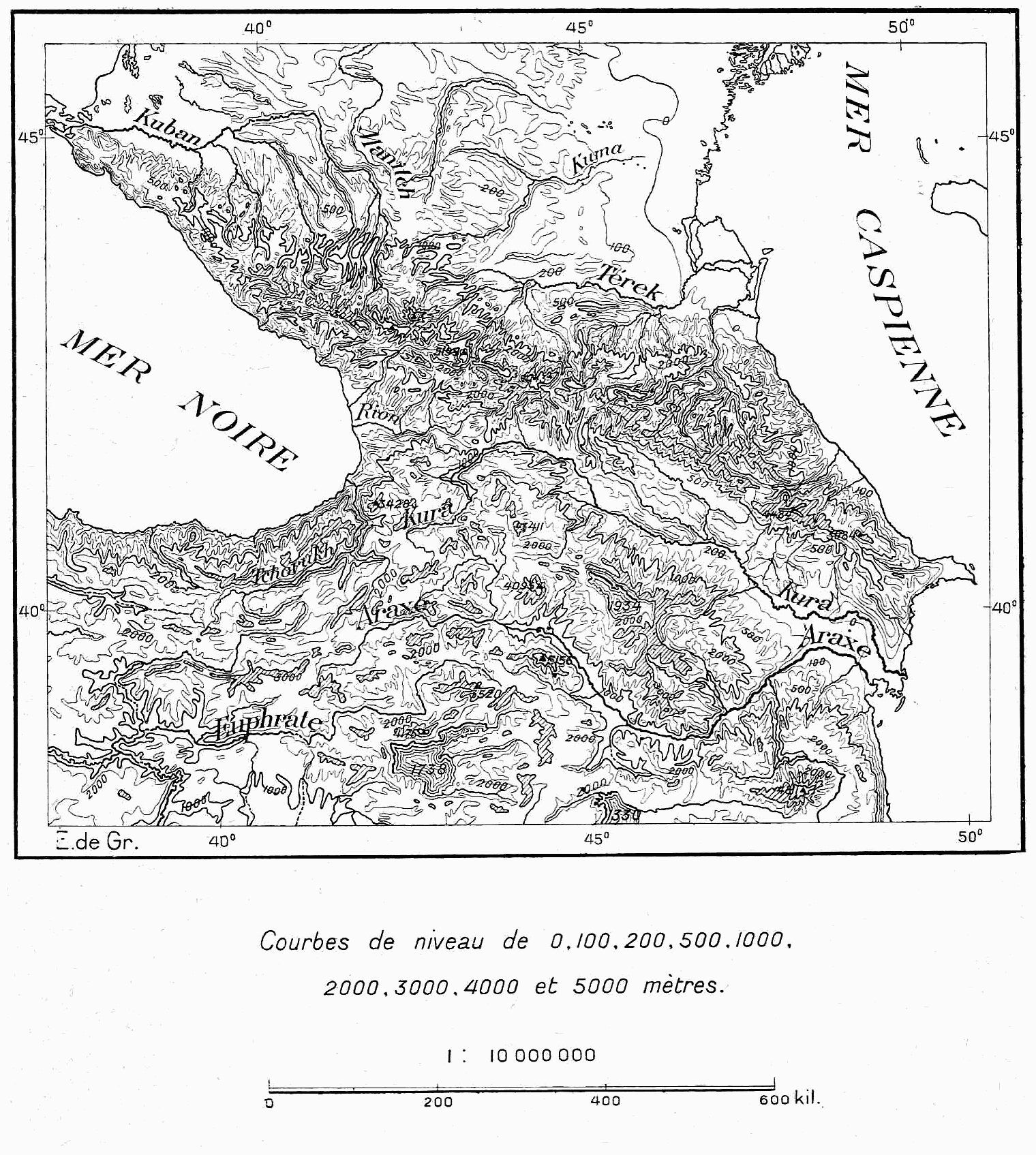 Relief du Caucase et des Monts d’Arménie